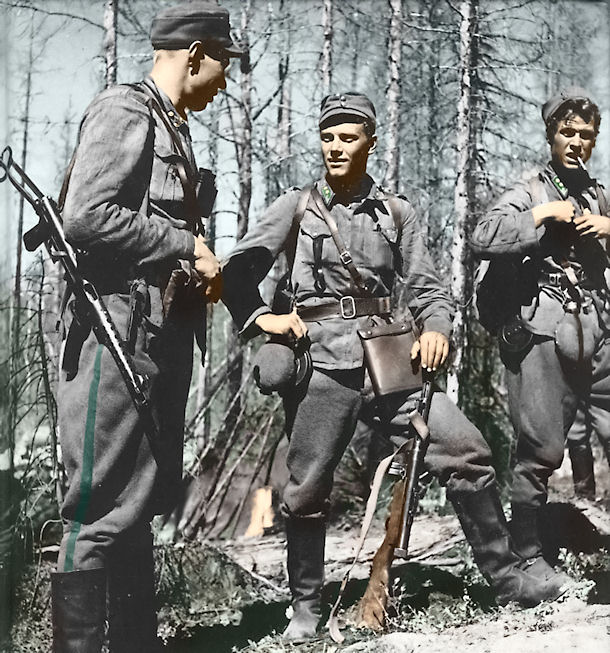 Törni Haukilahden taistelun jälkeen: vasemmalta JR 33:n kapteeni Pentti Railio, luutnantti Lauri Törni ja luutnantti Holger Pitkänen